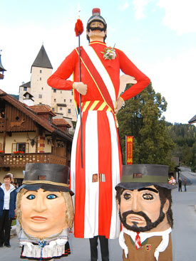 Sansom Mautendorf